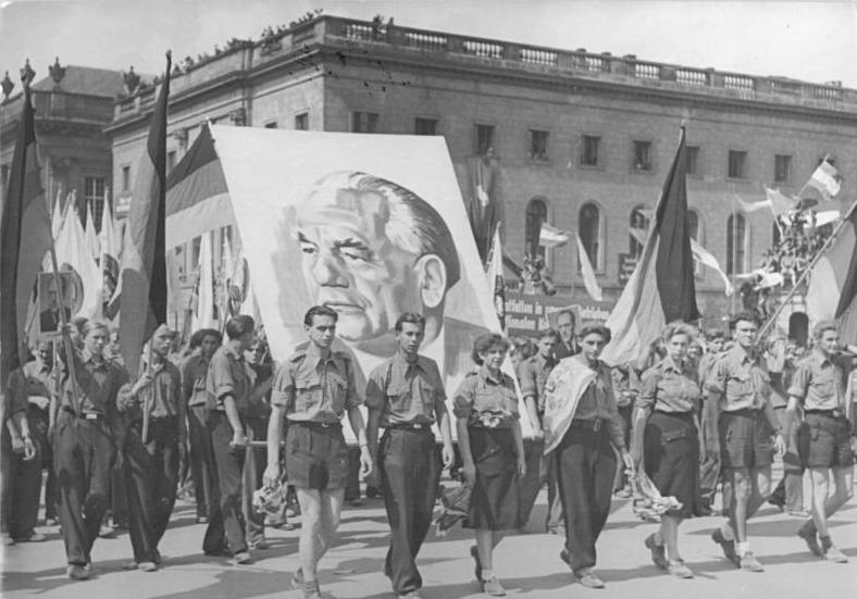 ADN-ZB Donath-Sei-Schm-III.Weltfestspiele der Jugend und Studenten in Berlin 1951 Die große Demonstration der jungen Friedenskämpfer Deutschlands am 12.8.1951 in Berlin. UBz: FDJ-Mitglieder im Demonstrationszug in der Straße Unter den Linden.